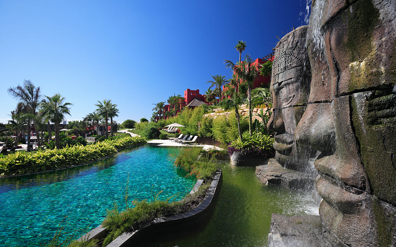 Hotel Barceló Asia Gardens & Thai Spa. Vista Asia Gardens.